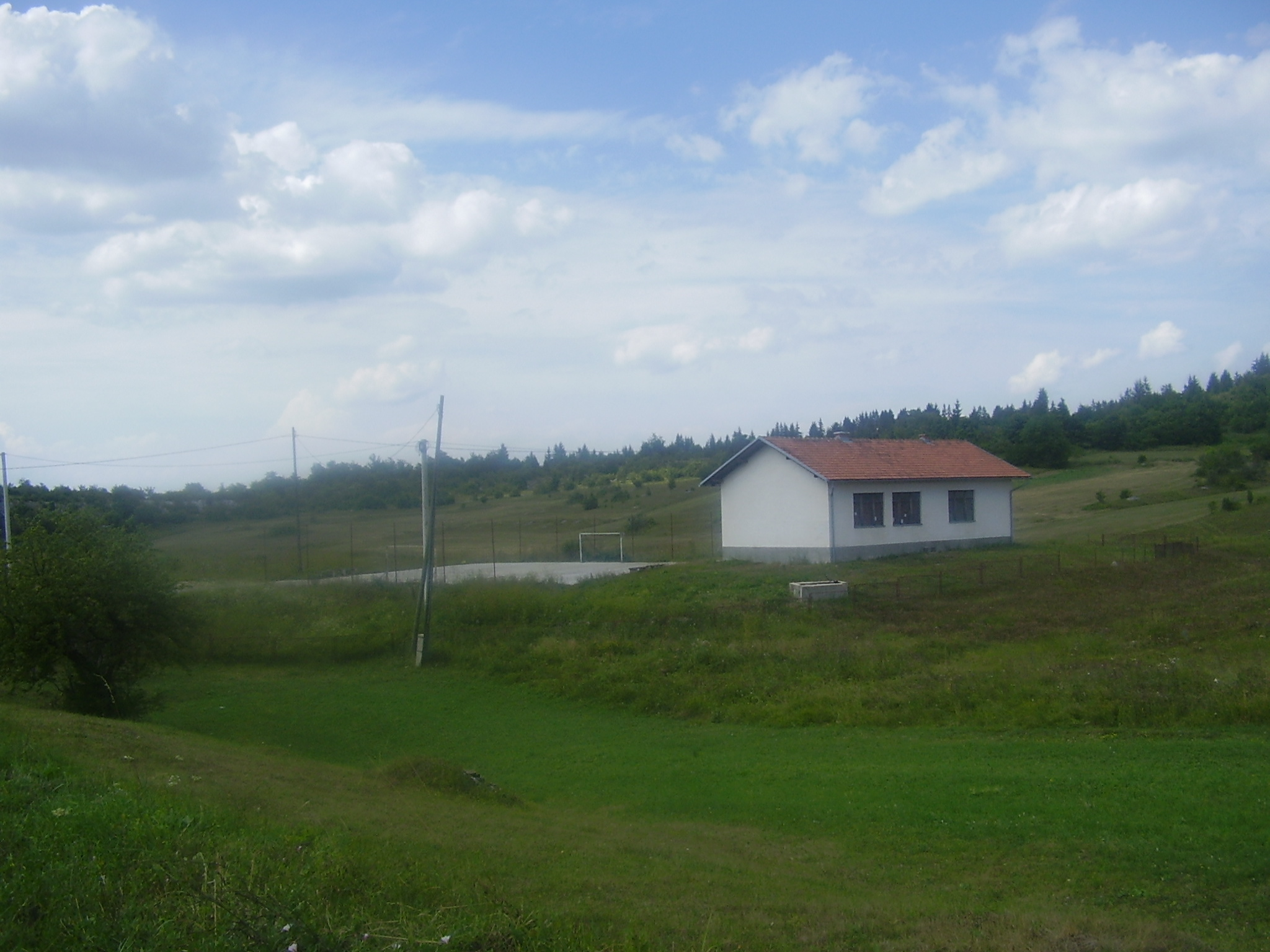 Pidriš, Uskoplje